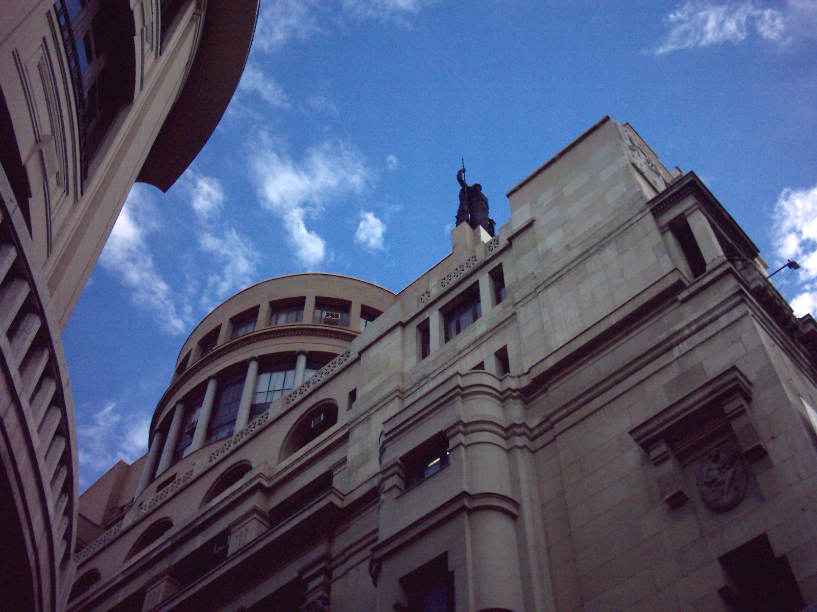 Madrid: Círculo de Bellas Artes. Arquitecto: Antonio Palacios. Madrid, Spain: Circle of Fine Arts. Architect: Antonio Palacios